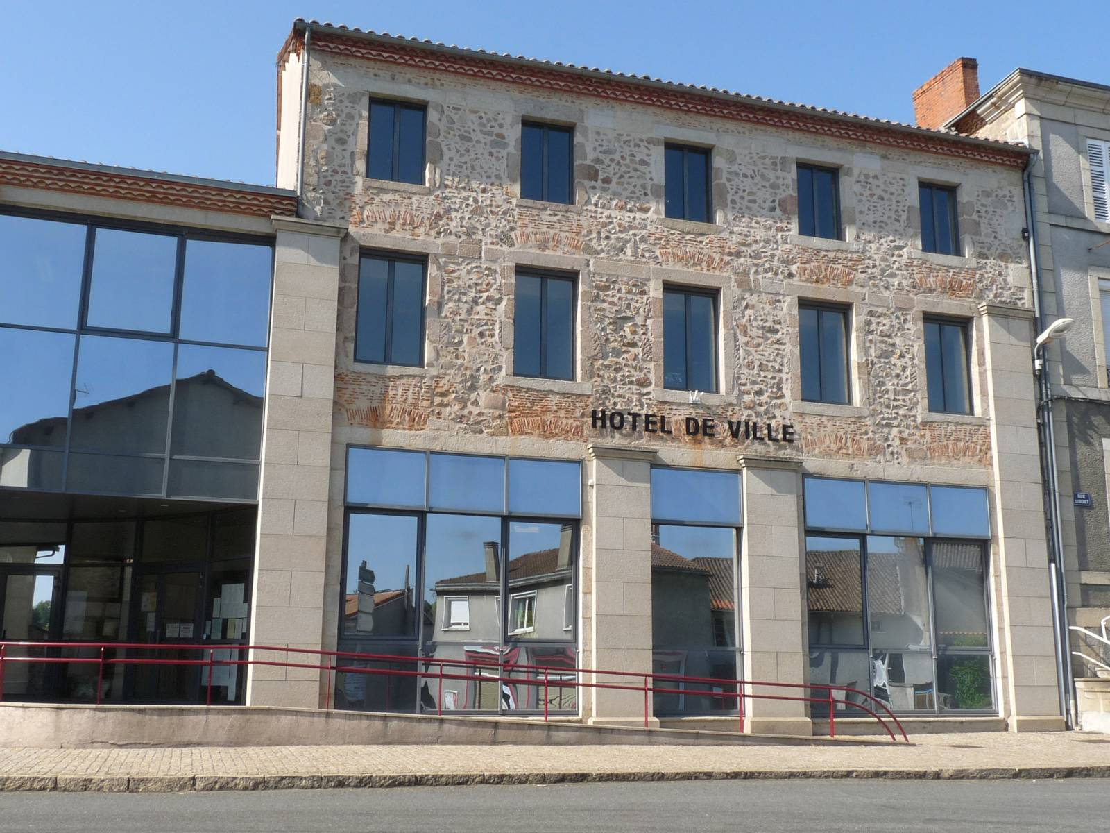 Hôtel de ville, Chabanais, France